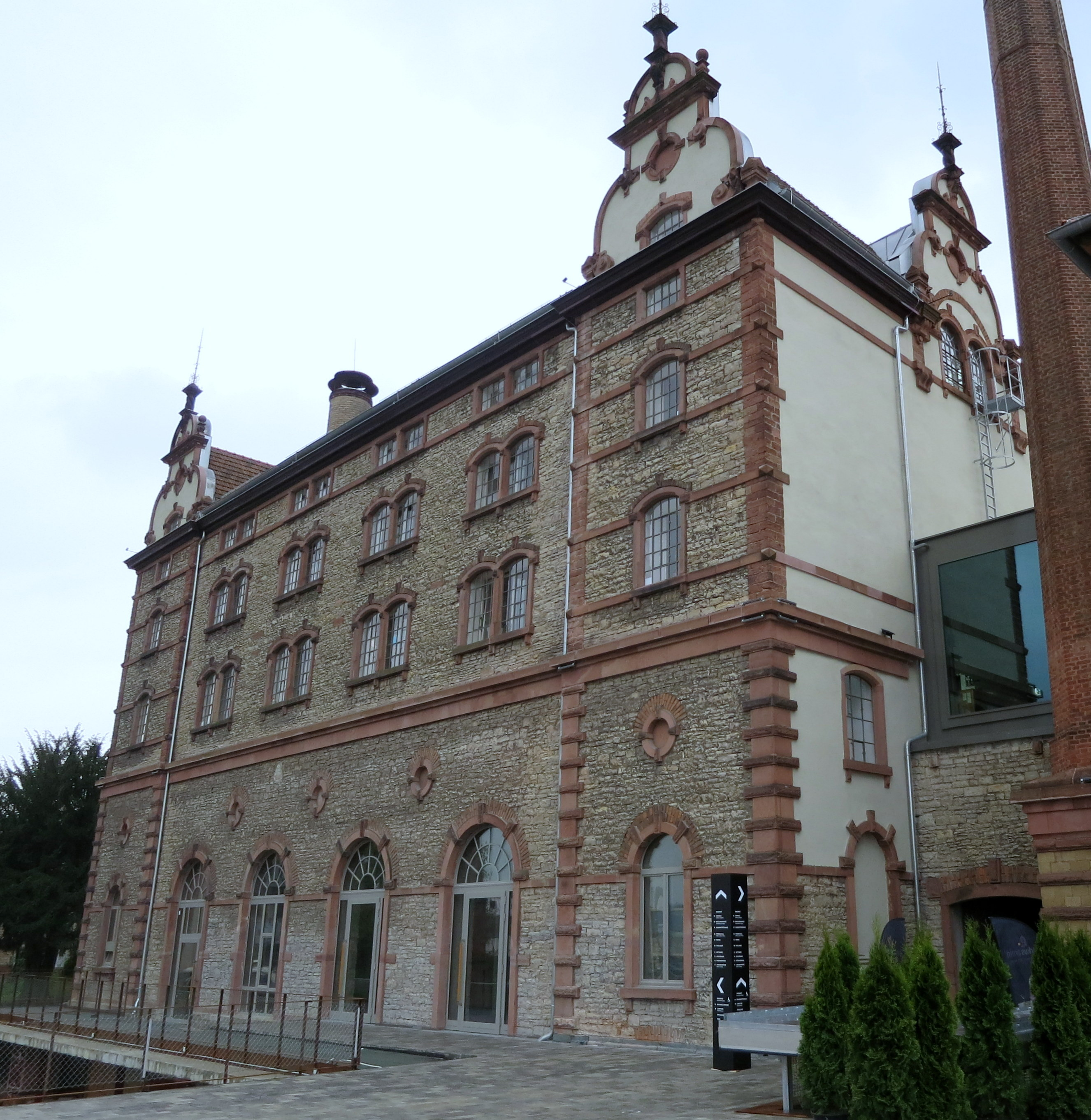 Bürgerbräu Areal, denkmalgeschützter Denkmalkomplex, jetzt Kultur- und Kreativzentrum